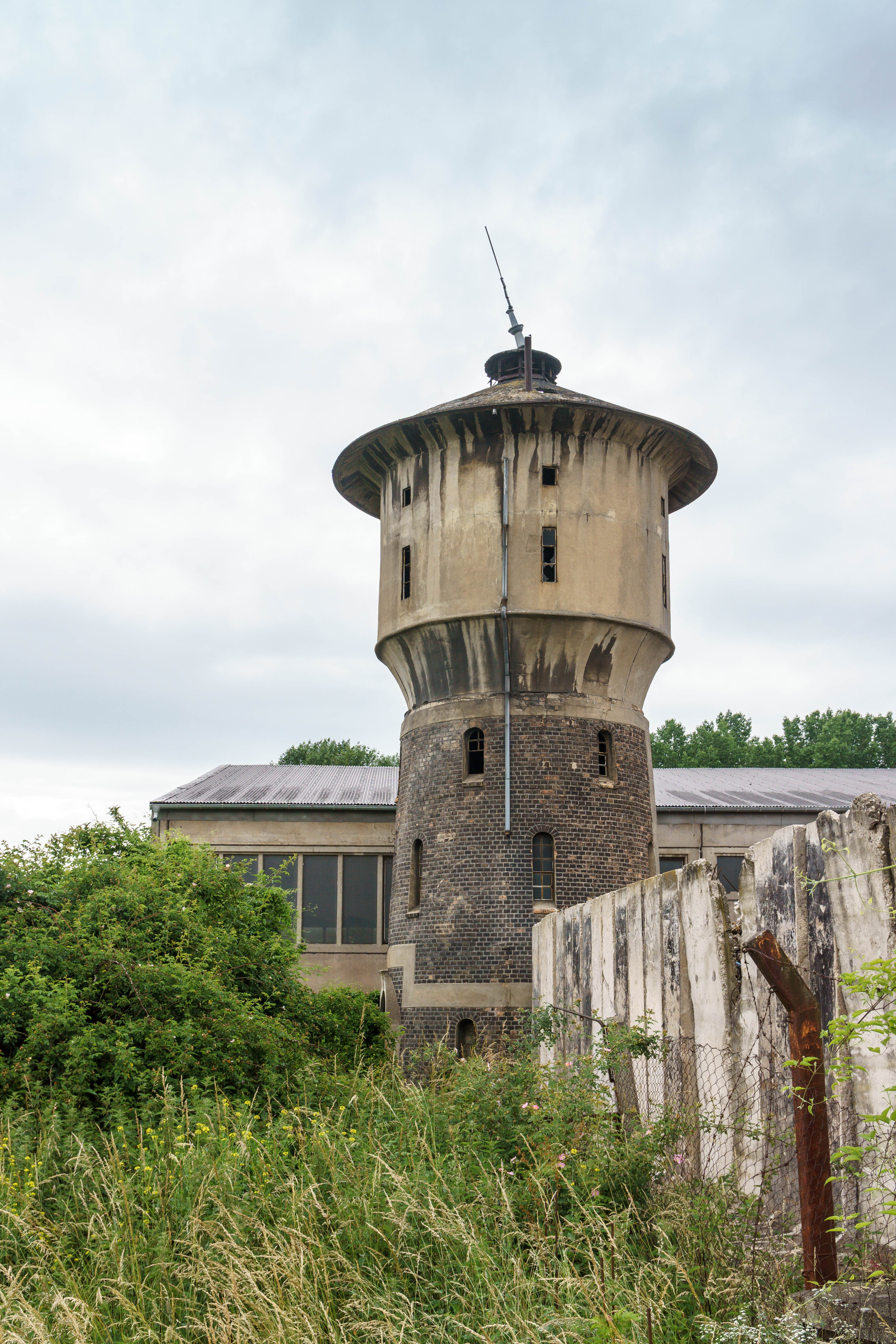 Wasserturm nördlich des Bahnhofs in Querfurt